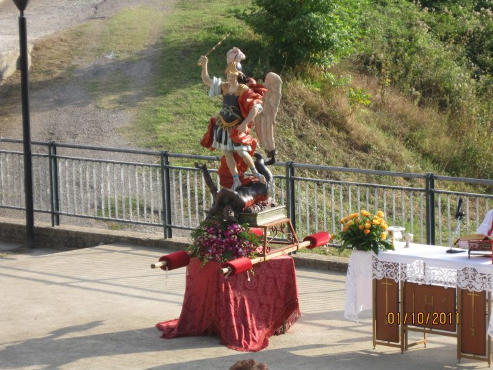 Statua S Michele Arcangelo Frazione S Tommaso Soveria Mannelli (CZ)